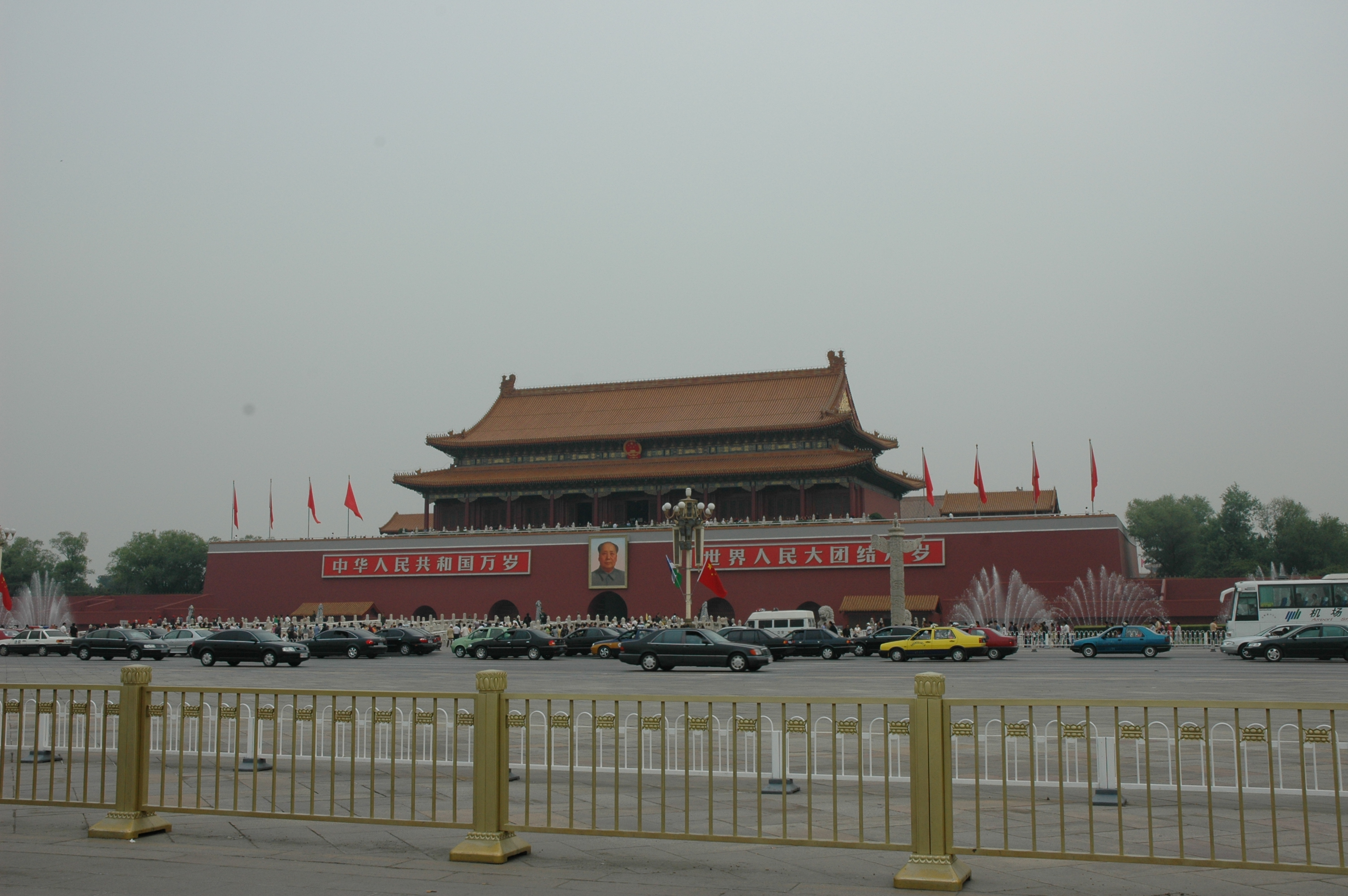 中文（台灣）: 136中國北京城Beijing, China